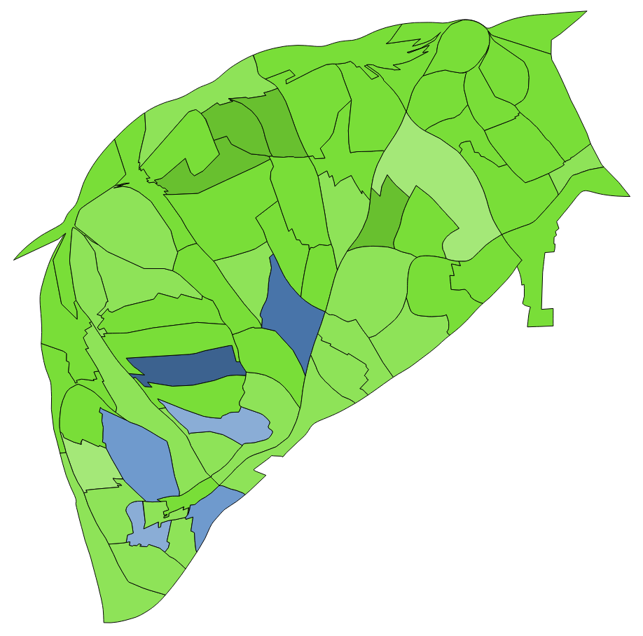 顏色對照表